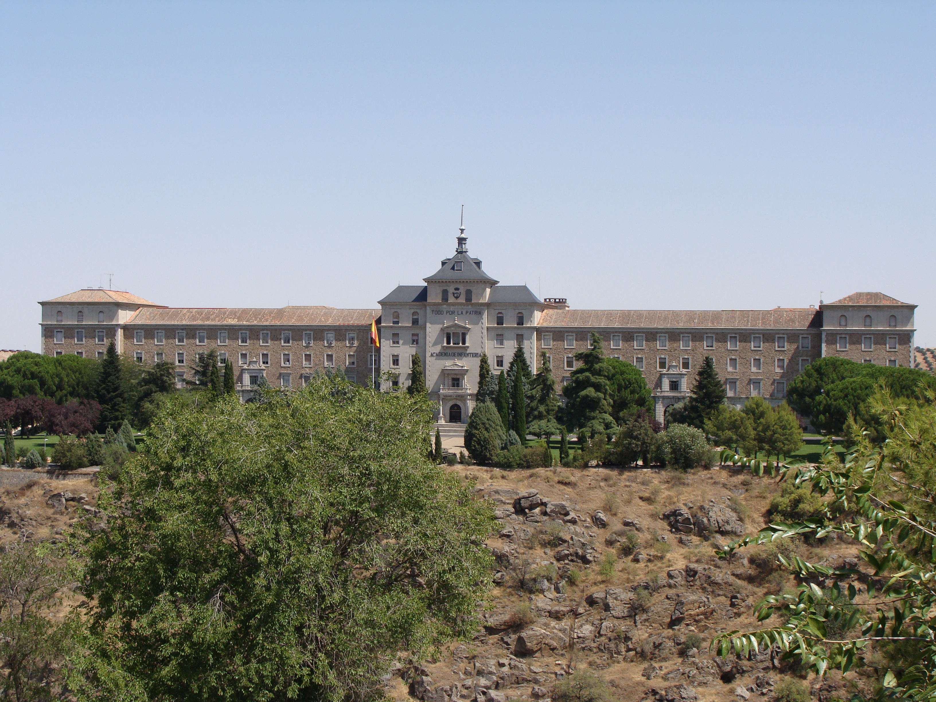 Infantry Academy, Toledo, Spain. Académie d'Infanterie, Tolède, Espagne